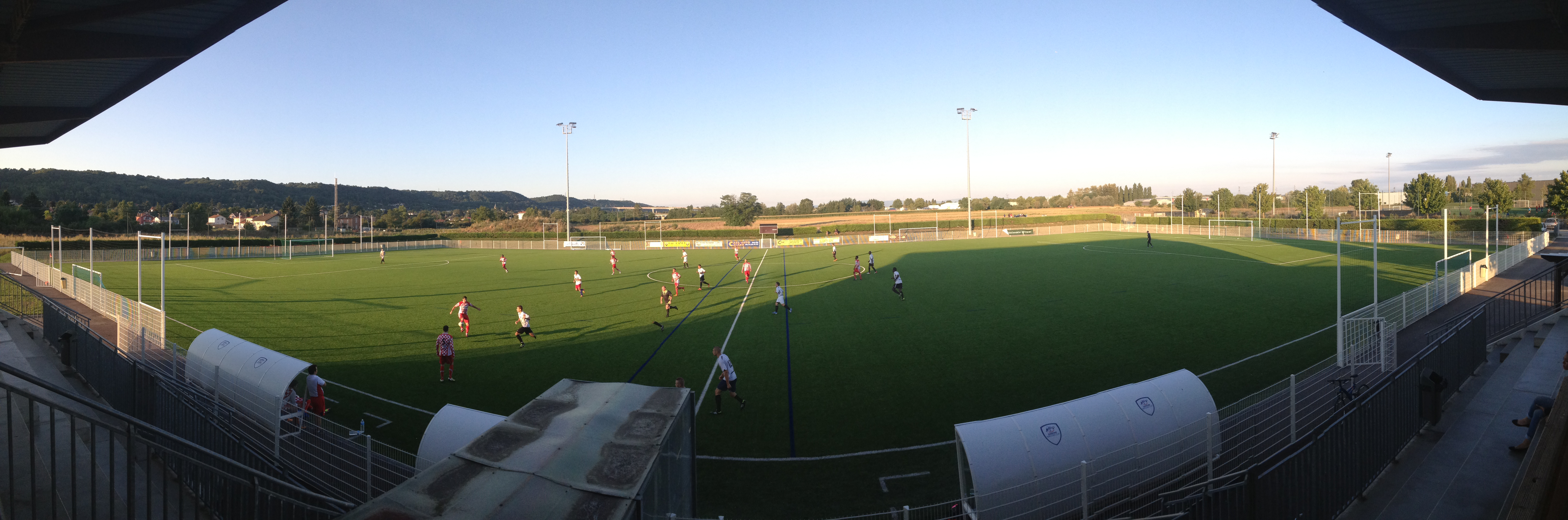 Match amical Ain Sud Foot contre le FC Lyon, au stade du Forum.